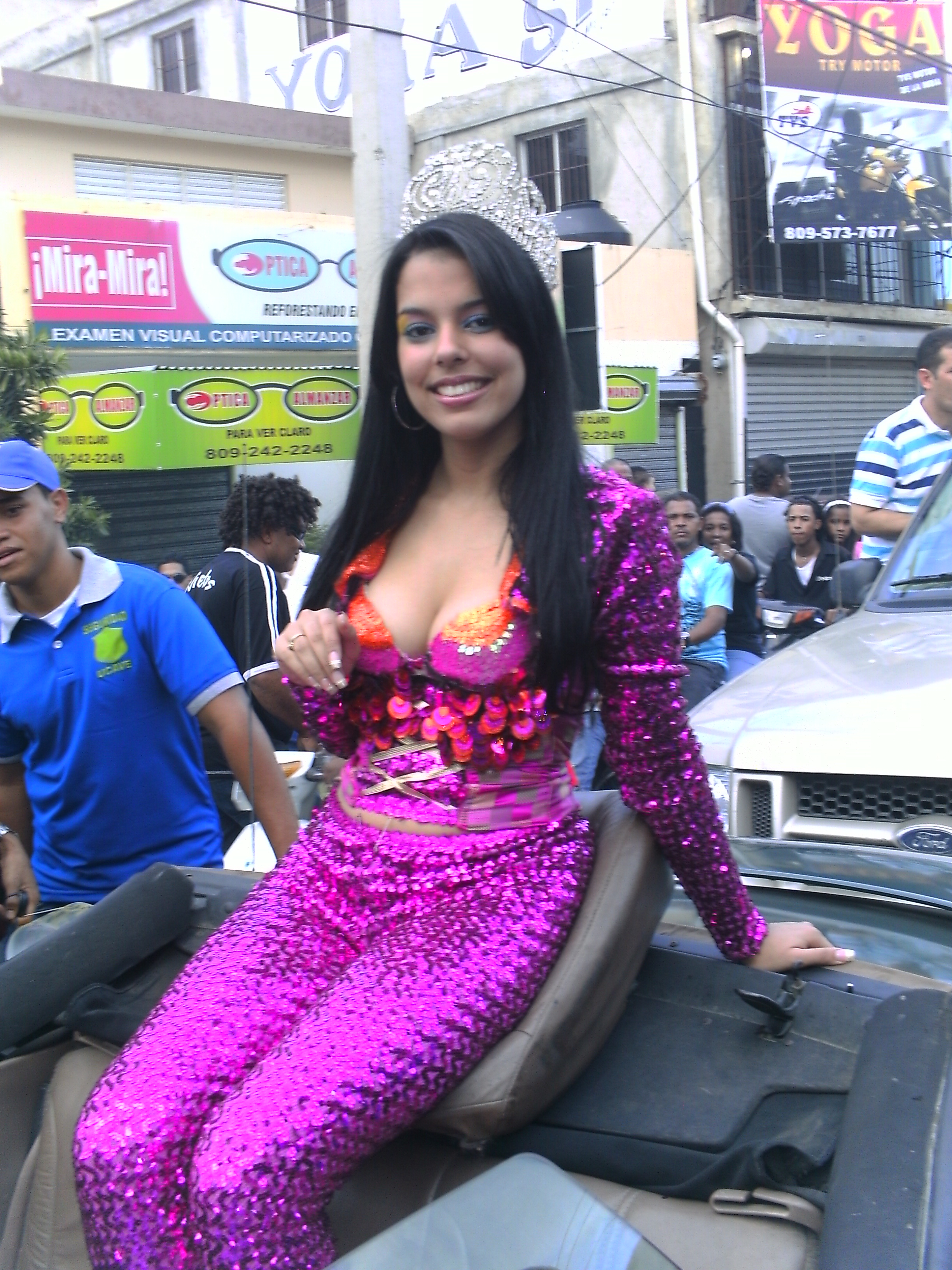 Charolyn Abreu, reina del Carnaval Vegano 2010 (La Vega, República Dominicana)